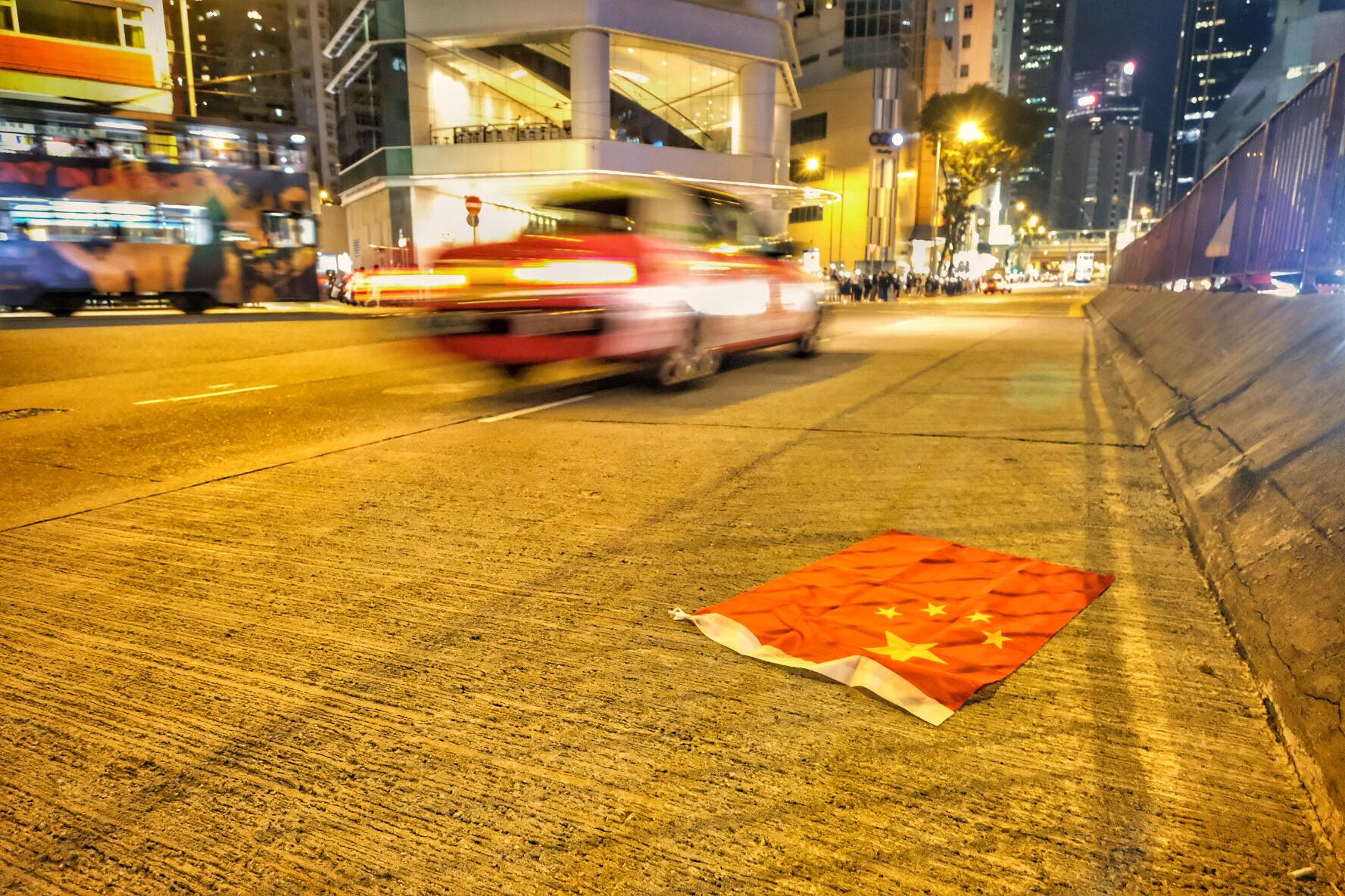 中文（香港）: 香港之路01